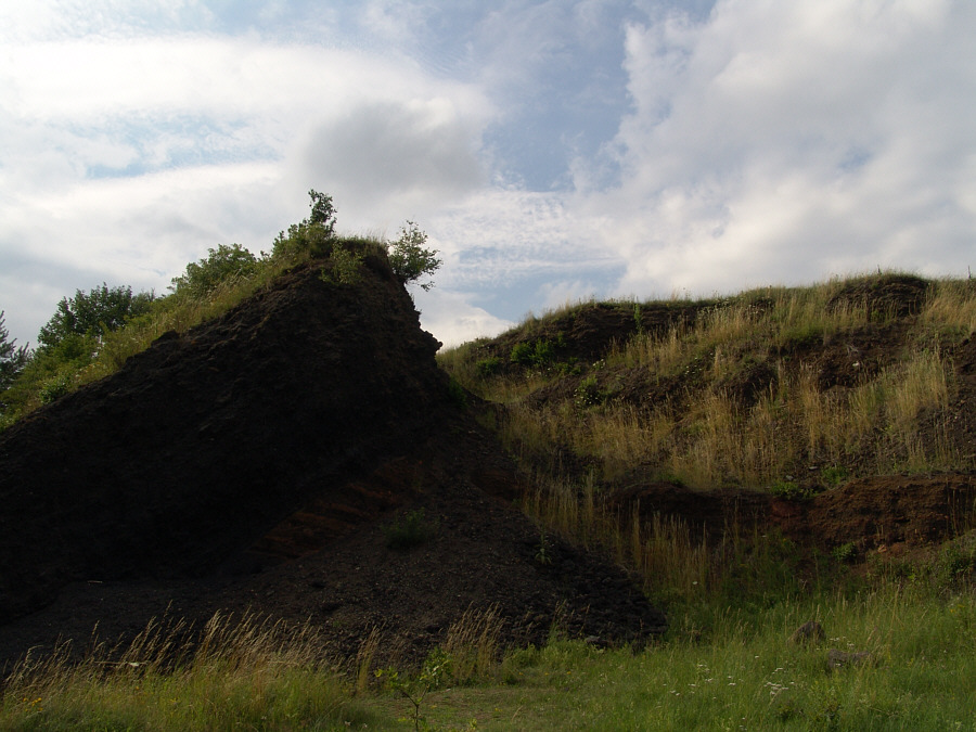 Der Vulkan Železná hůrka (deutsch: Eisenbühl) an der bayerisch-tschechischen Grenze. (2005) Fotograf: Walter J. Pilsak, Waldsassen Copyright Status: GNU Freie Dokumentationslizenz